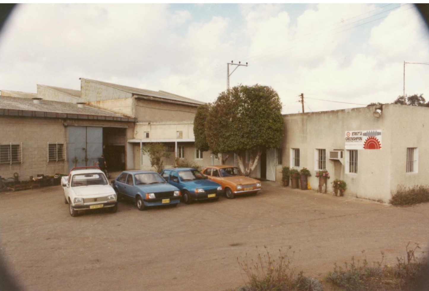 מפעל גרינשפון - יציקה בתבניות